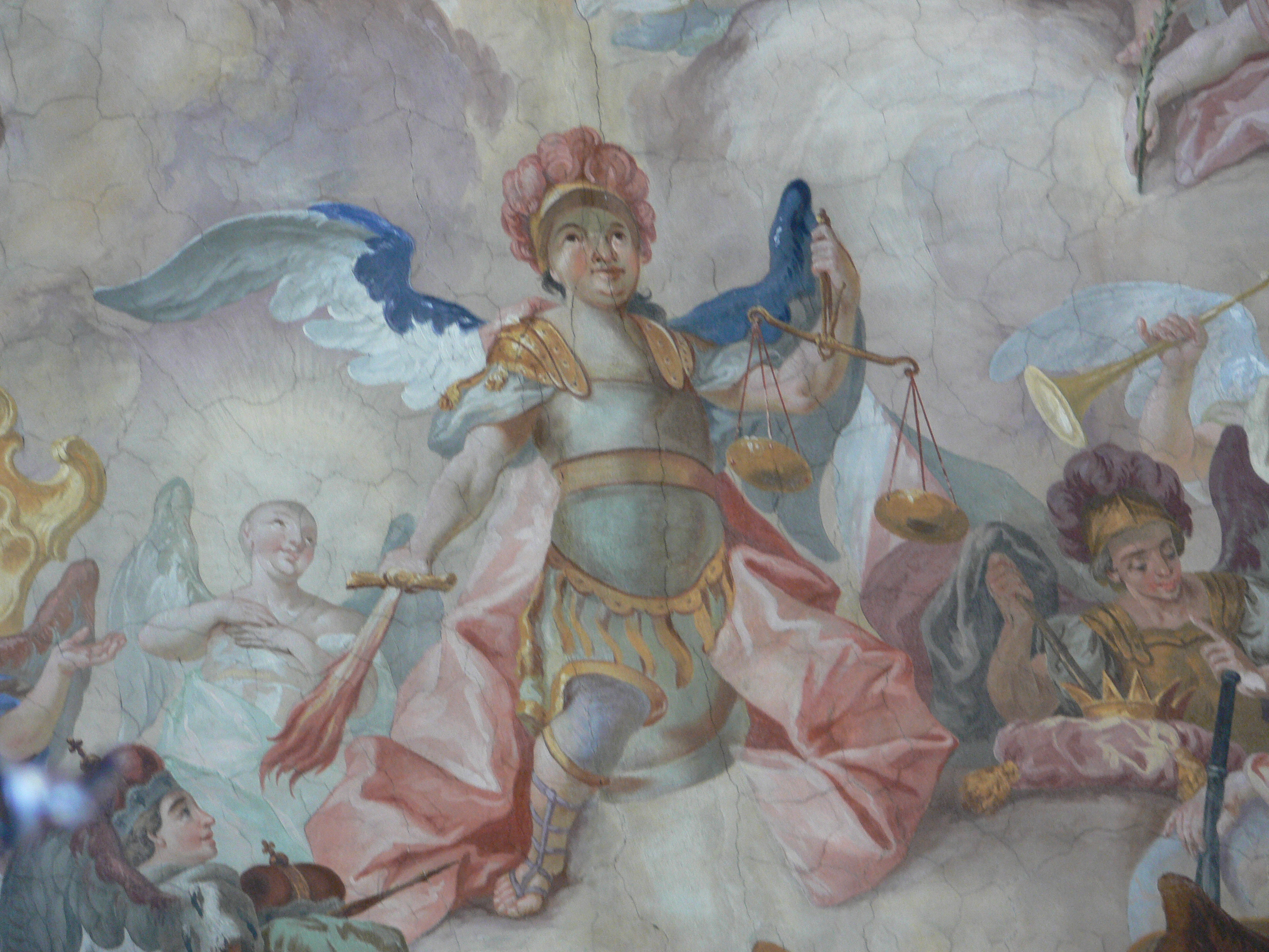 detail